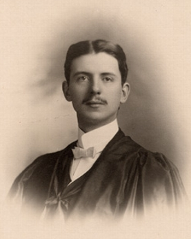 Hector Laferté, Quebec politician